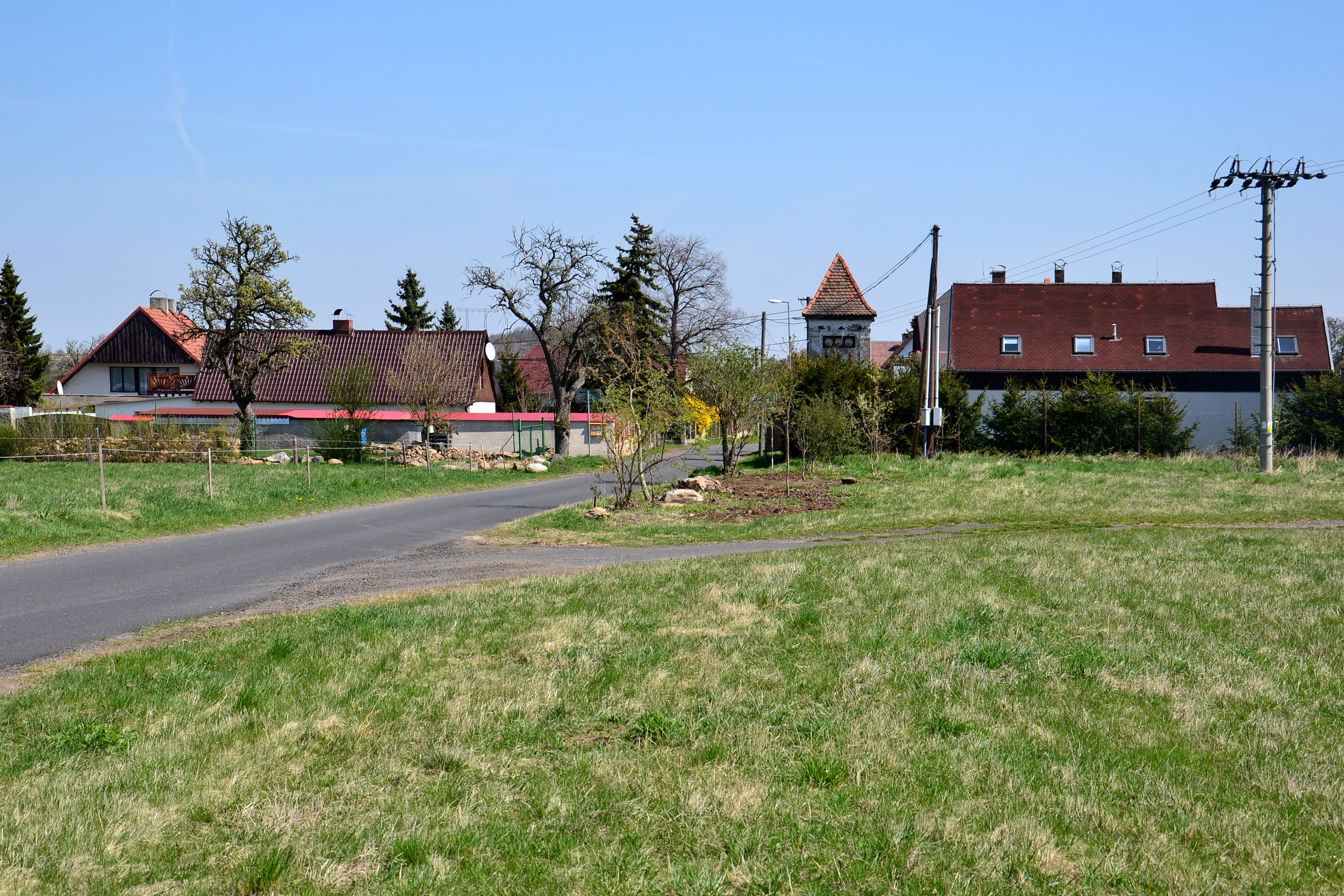 Celkový pohled od západu